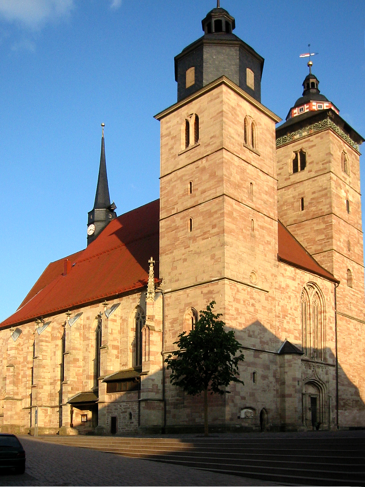 Stadtkirche Sankt Georg auf dem Altmarkt